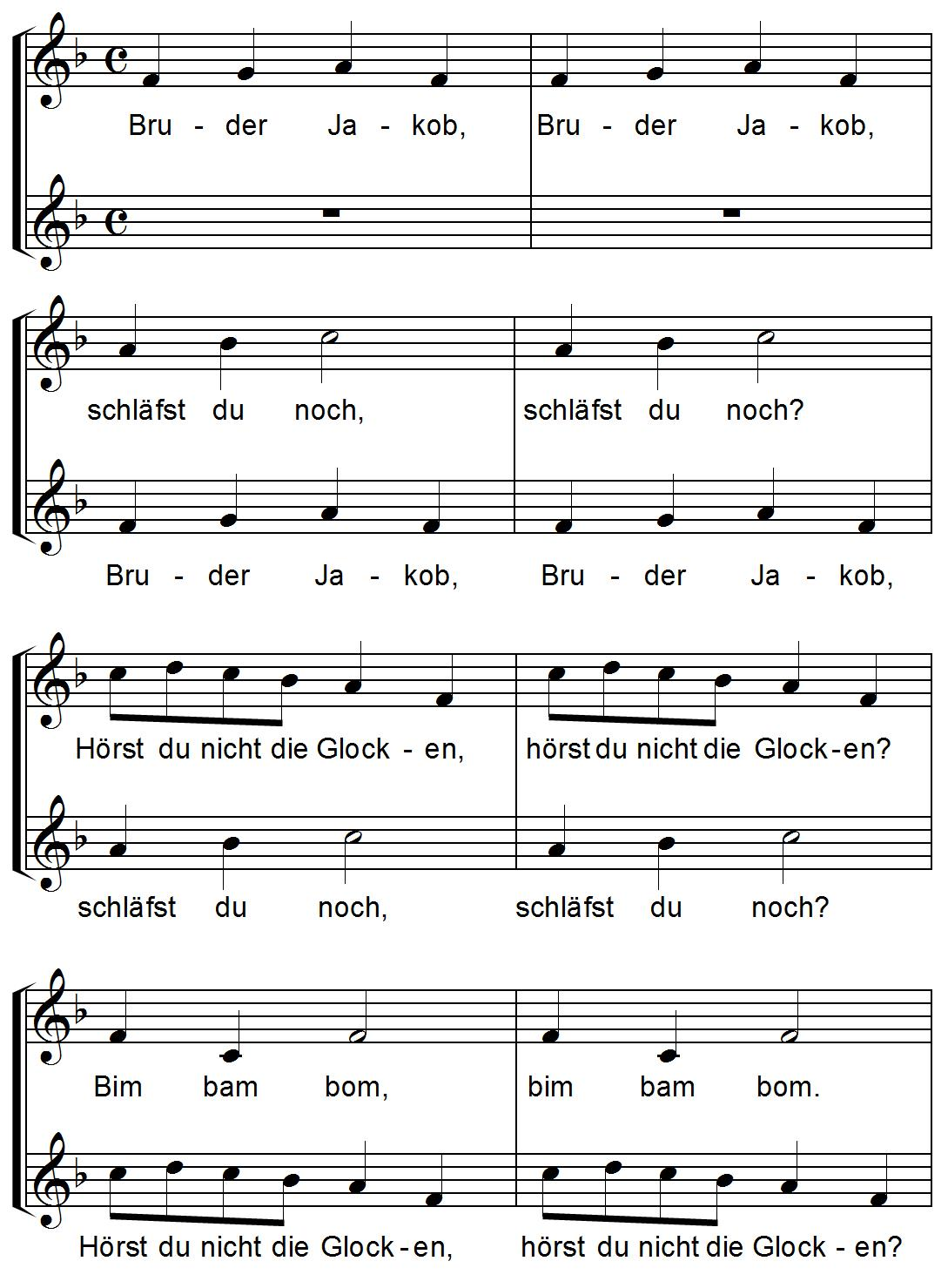 Немецкая народная песня "Братец Яков" (в каноническом изложении)